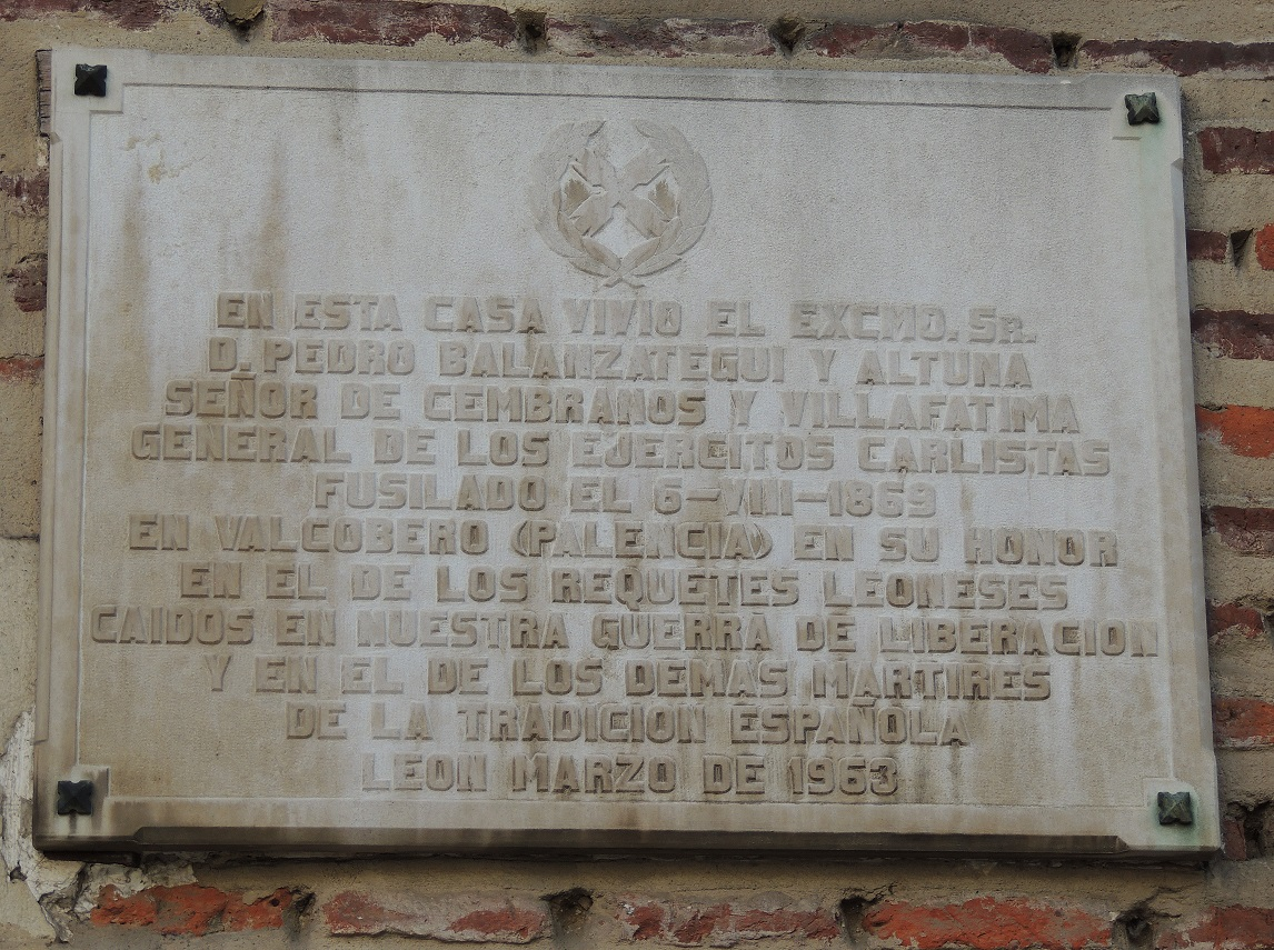 Lápida en honor de Pedro Balanzátegui en la plaza de San Marcelo de León